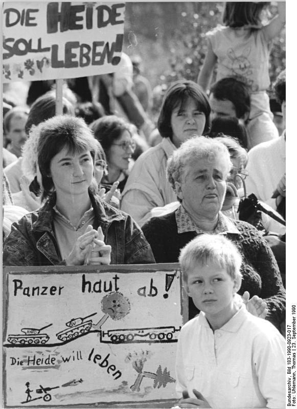 ADN- Thomas Uhlemann 23.9.90 Bez. Magdeburg: Demo- Mehrere Tausend Menschen demonstrierten für die Entmilitarisierung und Rekultivierung des Truppenübungsplatzes Colbitz-Letzlinger-Heide. Sie befürchten die Übernahme des bisher von der Sowjetarmee genutzten Übungsgeländes durch die NATO.